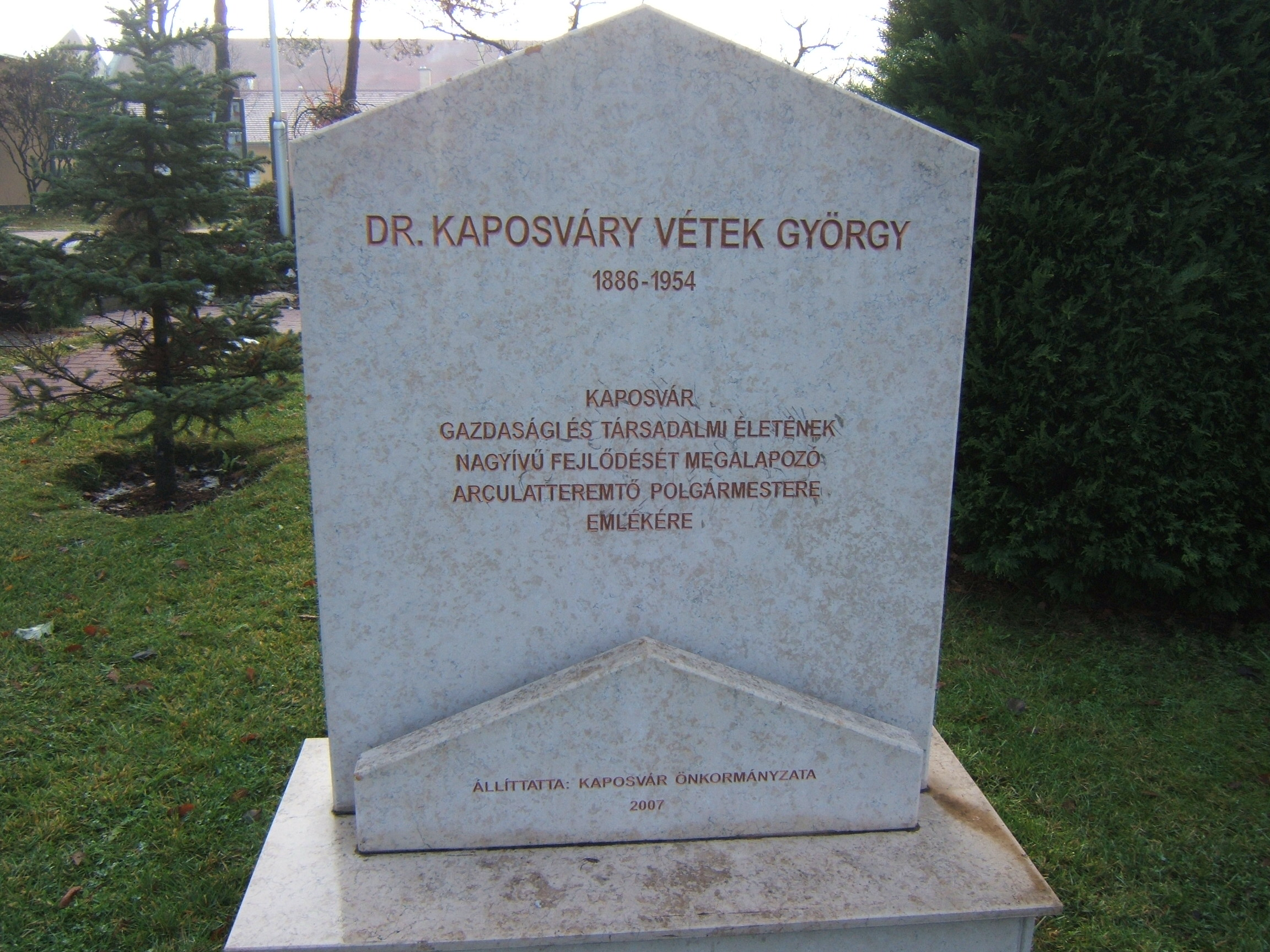 Kaposvár, Kaposváry György emlékműve